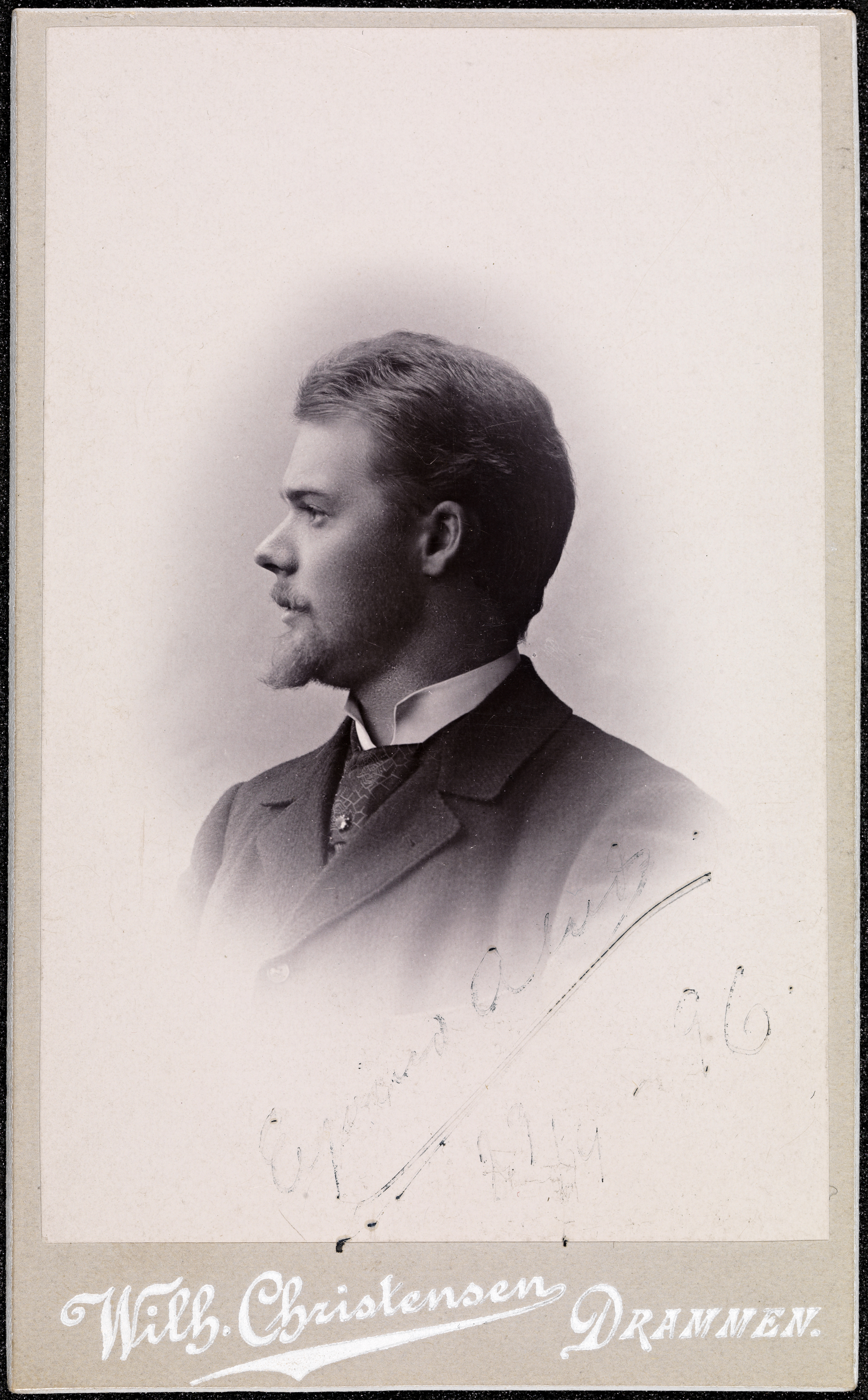 Beskrivelse / Description: Eyvind Alnæs var komponist, organist og dirigent. Dato / Date: ca. 1896 Fotograf / Photographer: Wilh. Christensen (Drammen) Digital kopi av original / Digital copy of original: s/h papirpositiv Eier / Owner Institution: Nasjonalbiblioteket / National Library of Norway Lenke / Link: Bildesignatur / Image Number: blds_02318